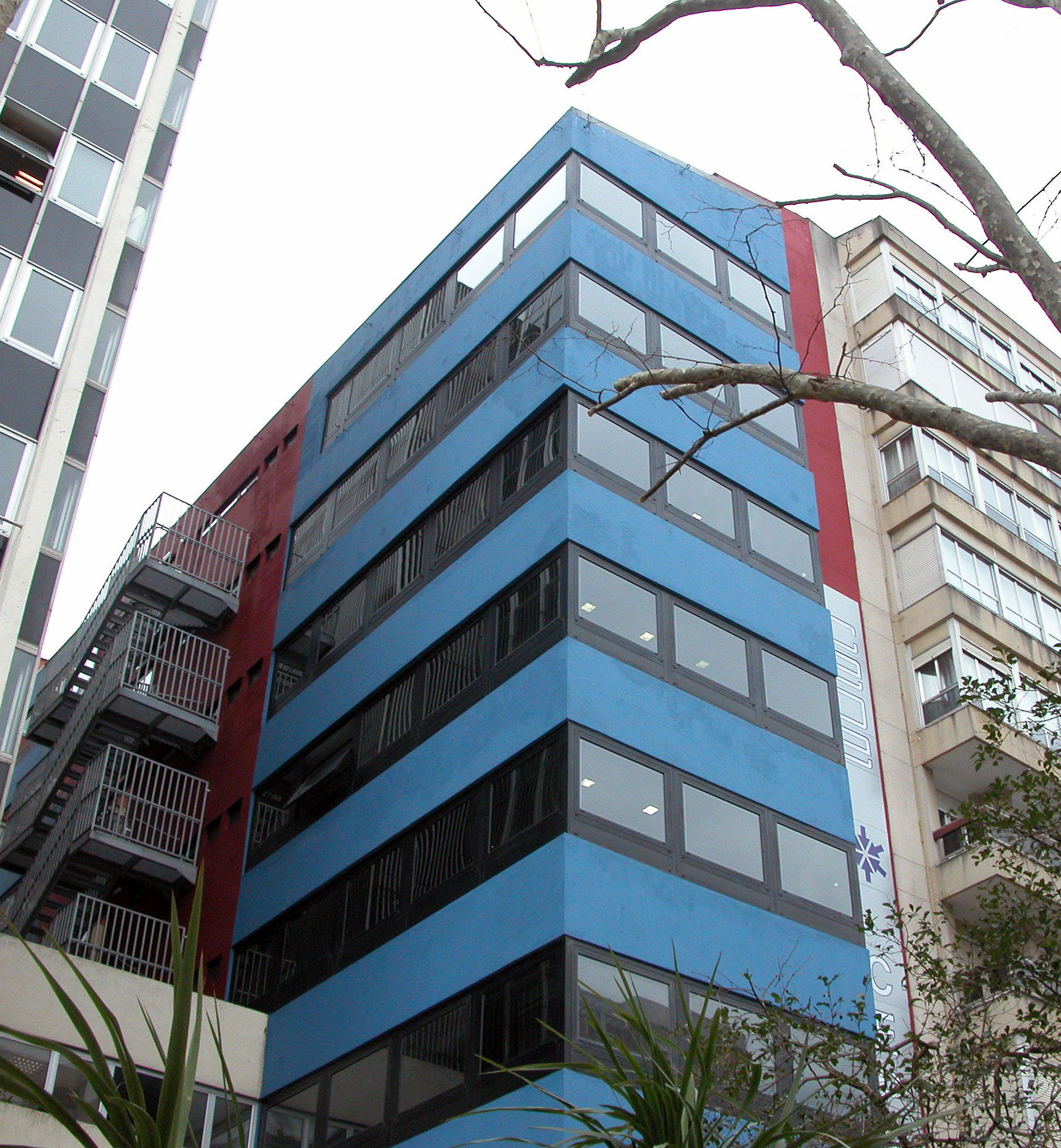 Edificio que alberga las oficinas de la Confederación de Empresarios de Cantababria (CEOE-CEPYME Cantabria), sito en la calle Tres de noviembre de Santander.